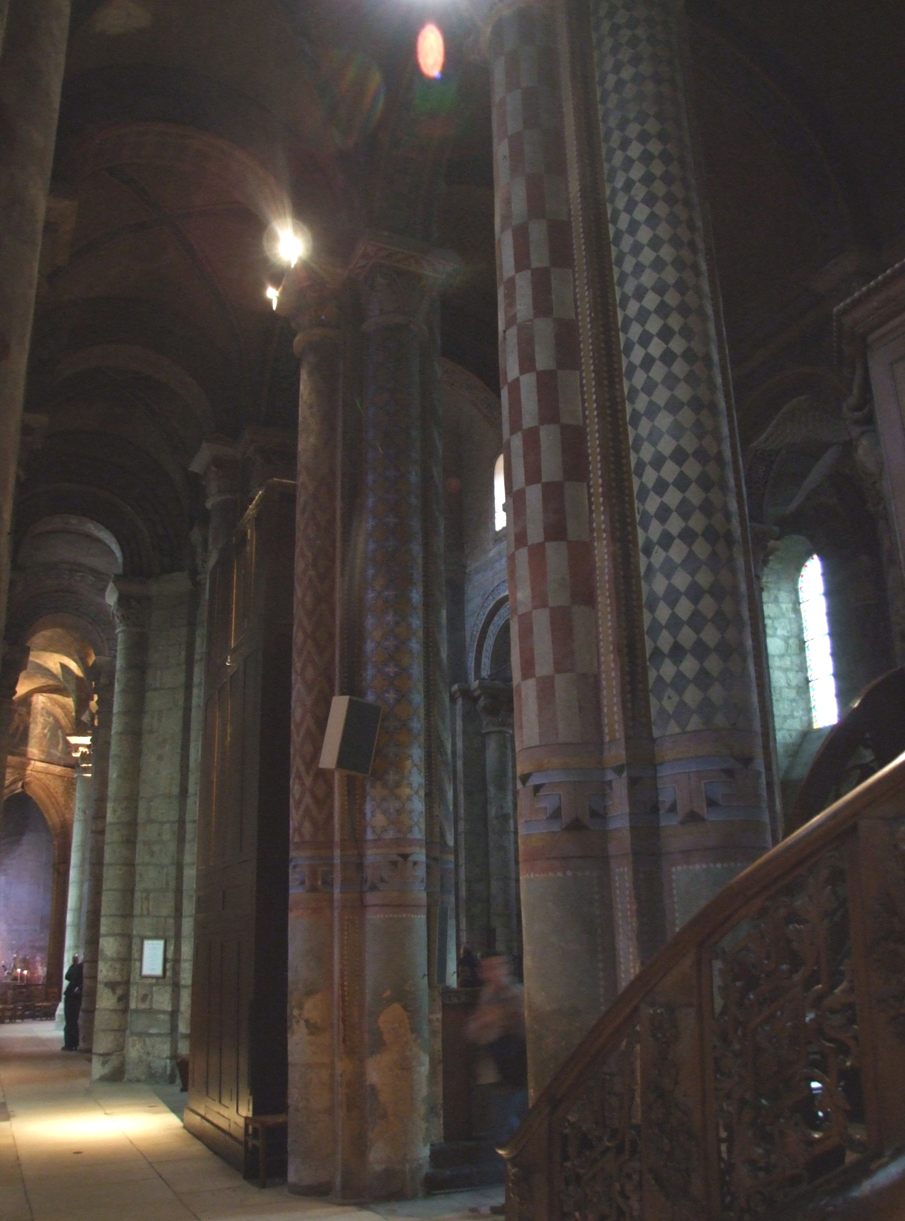 Notre-Dame la Grande de Poitiers, Poitiers, Poitou-Charentes, FRANCE